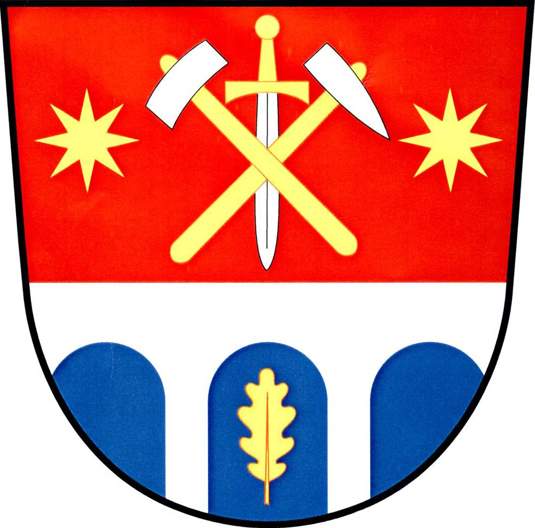 Znak obce Jezdovice